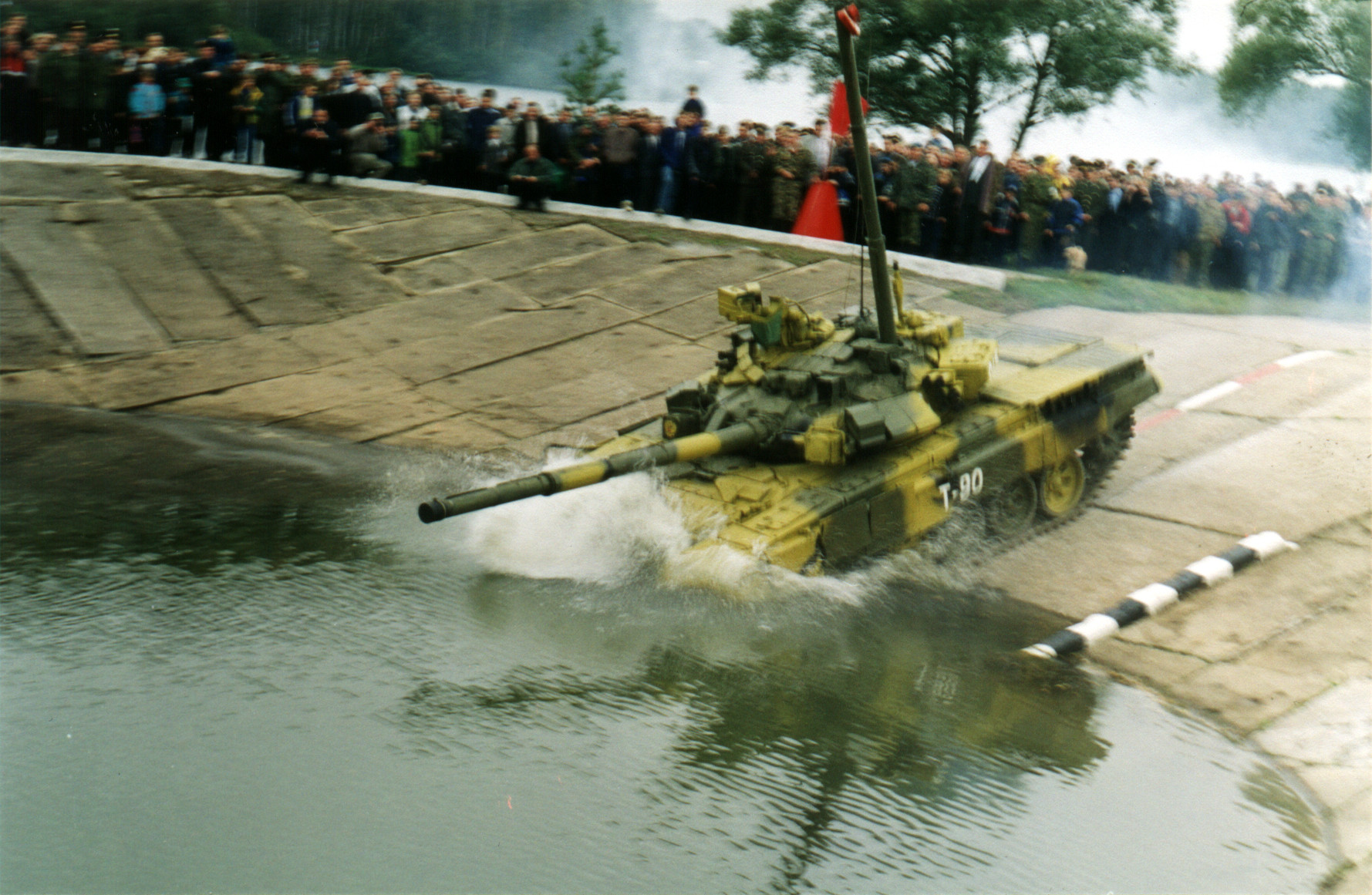 Author=Sergey Dukachev Date=September, 2000